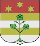 Fasciato d'oro e d'argento, di quattro pezzi, alla pianta di canapa di verde attraversante sul tutto, con il capo di rosso, carico di tre stelle (stemma)